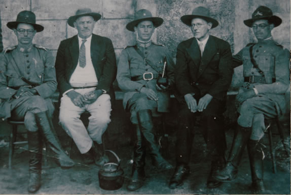 Inauguração da Usina Hidrelétrica de Braço do Norte, com a presença dos revolucionários gaúchos de 1930